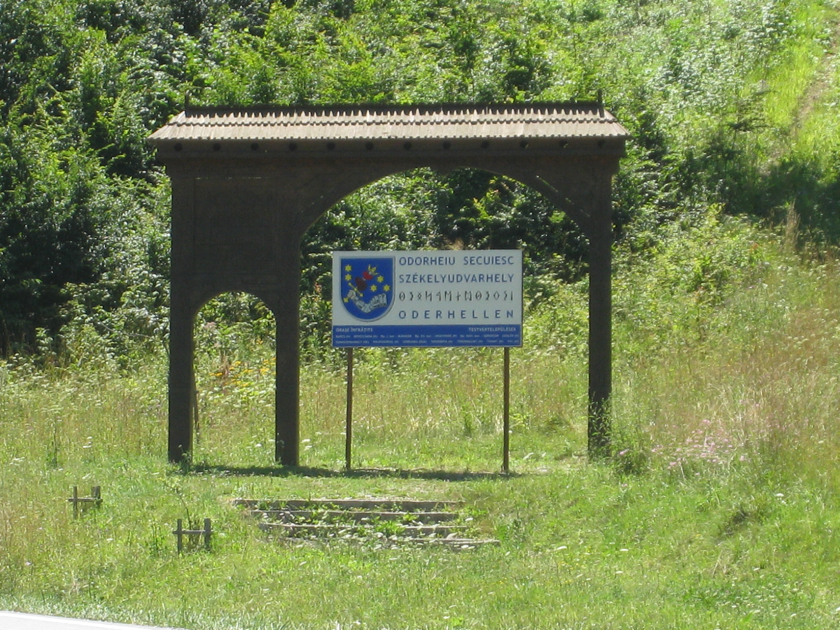 Ortseingangsschild von Oderhellen(dt)